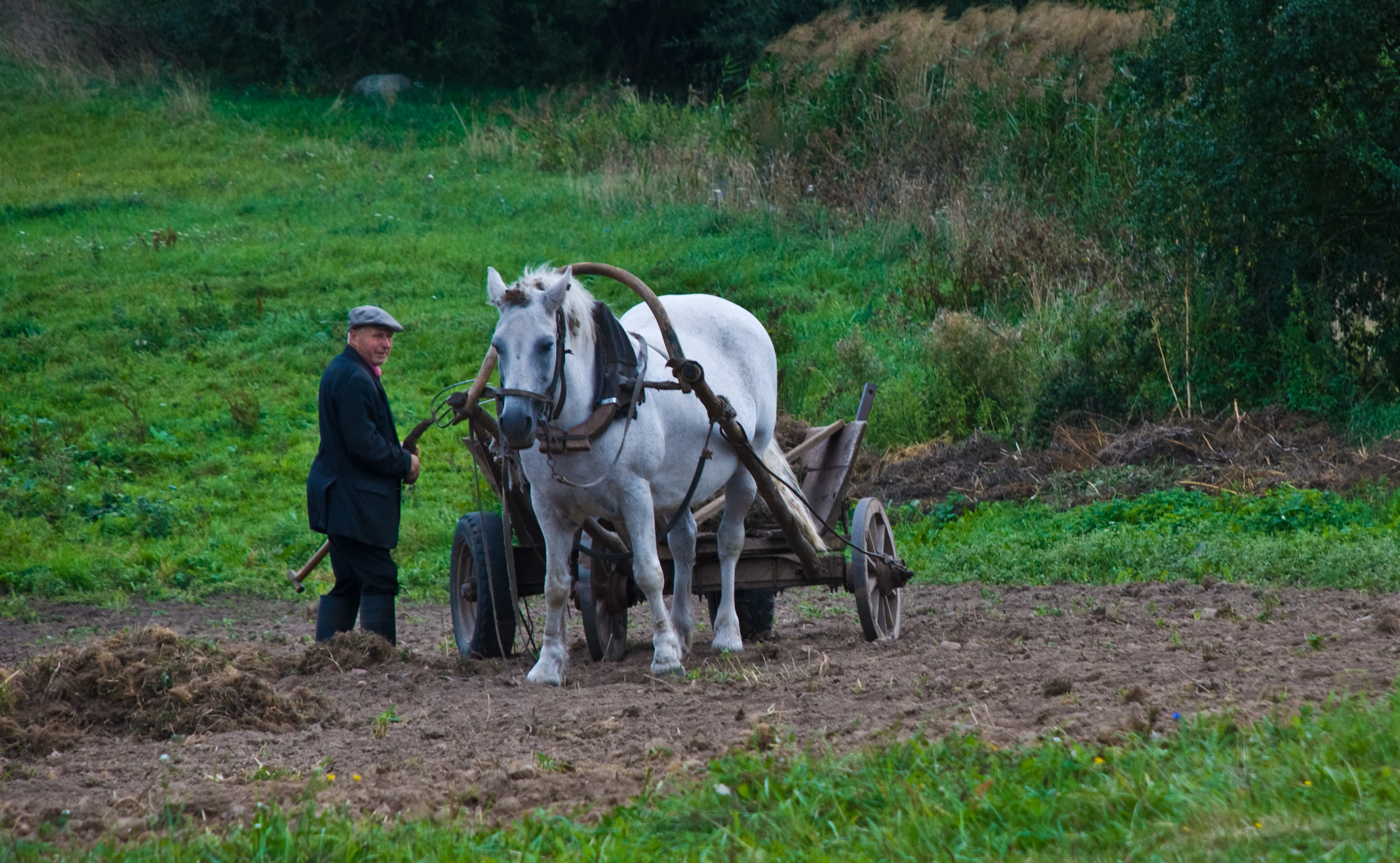 Near Nikalauciskes, Lithuania, 11 Sept. 2008